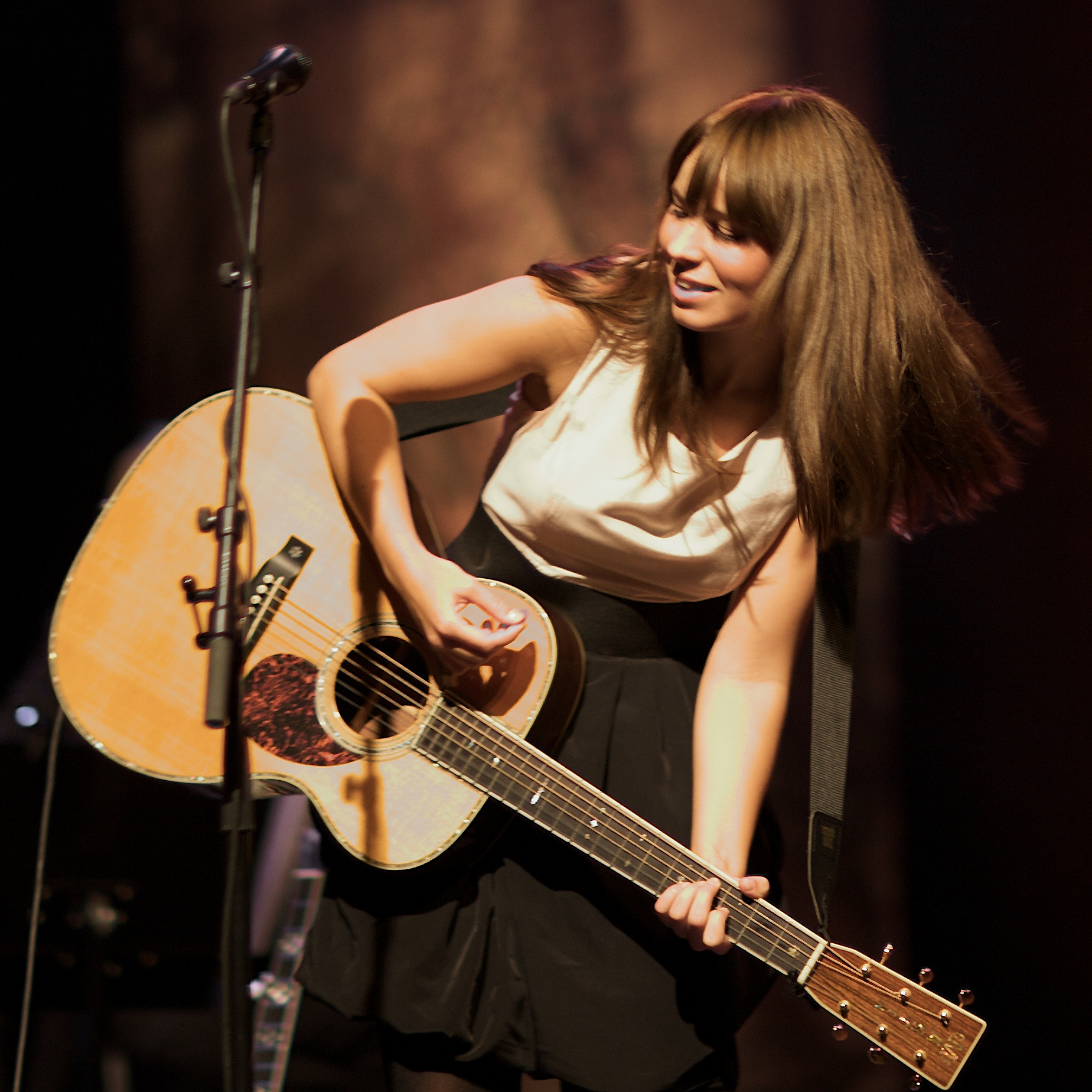 Marit Larsen med Trondheimssolistene i Ibsenhuset